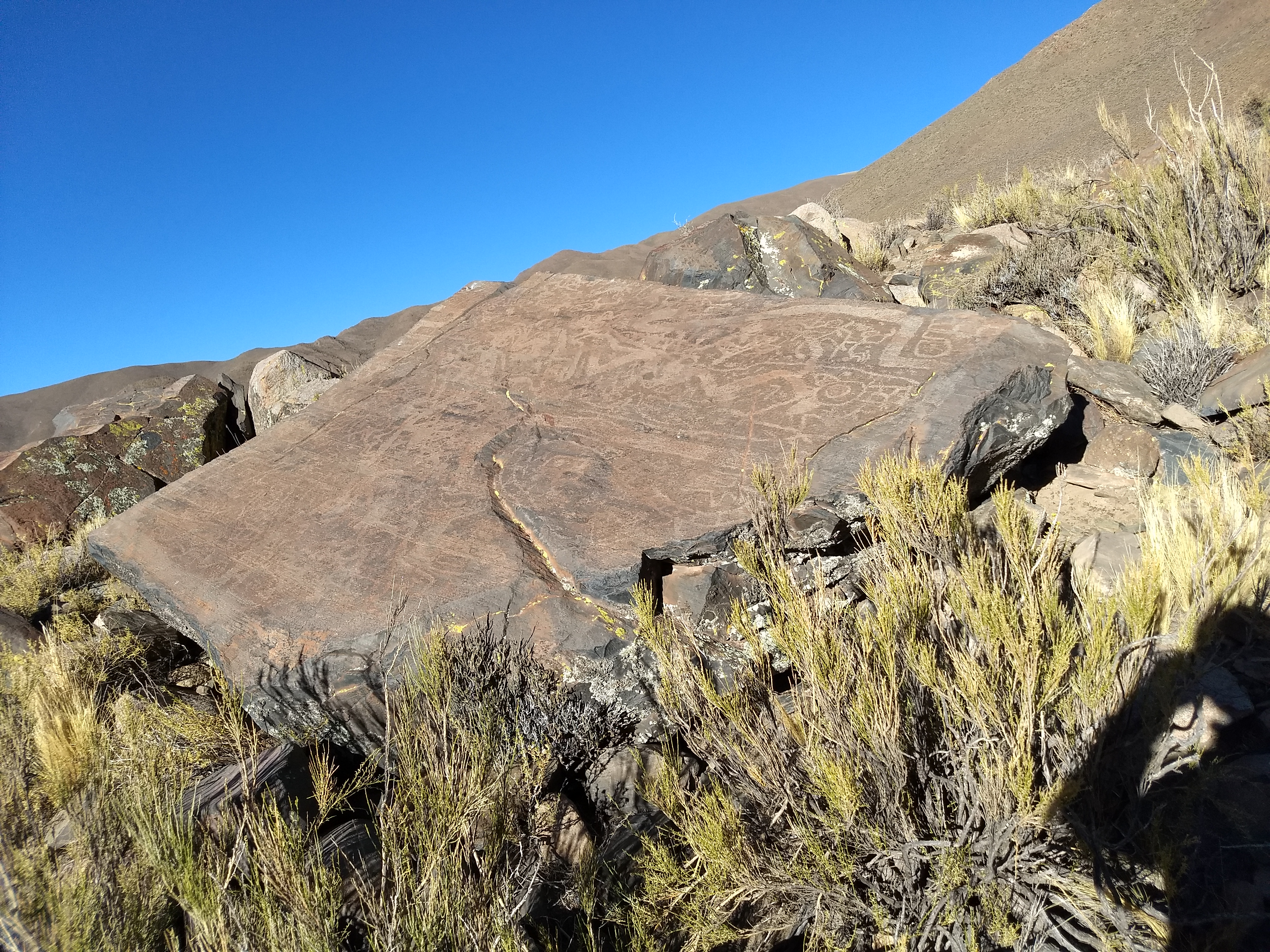 cultural. monumento